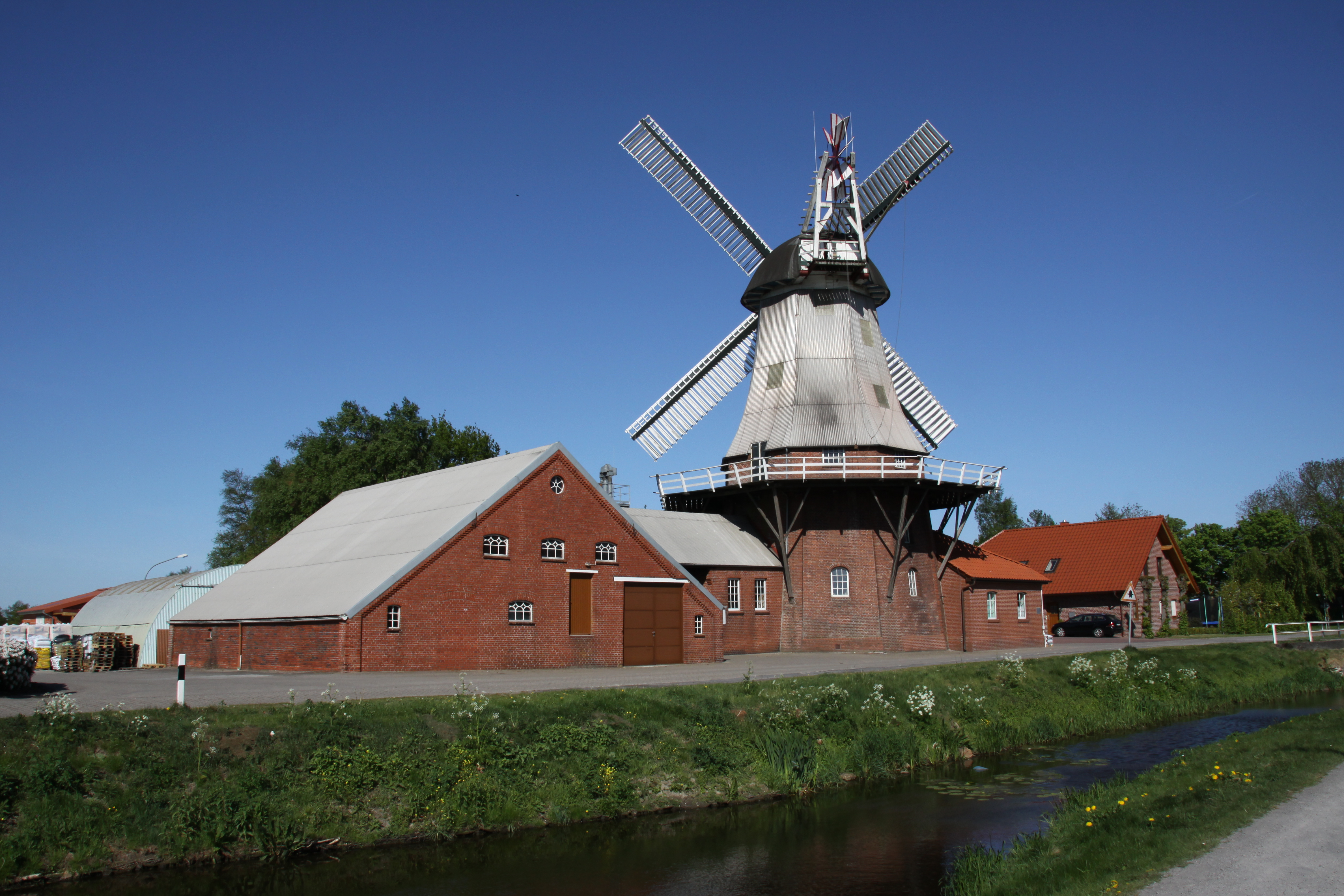 Mühle Warsingsfehn-West